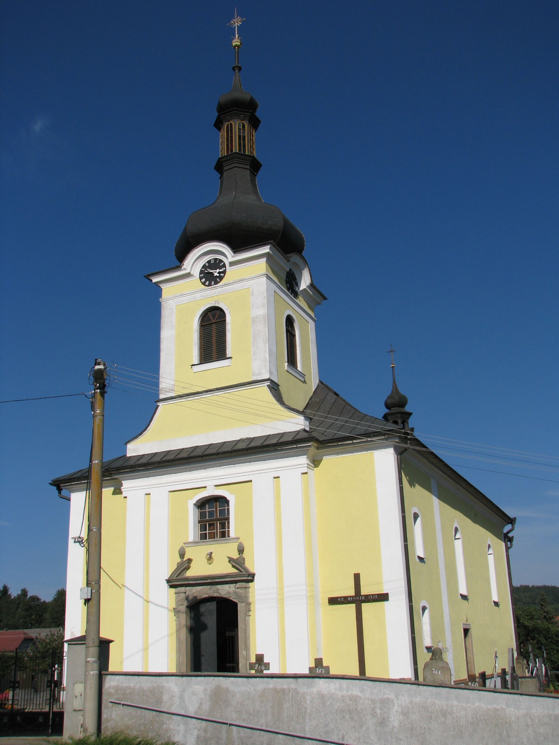 Kostel sv. Václava (Radešínská Svratka), Radešínská Svratka